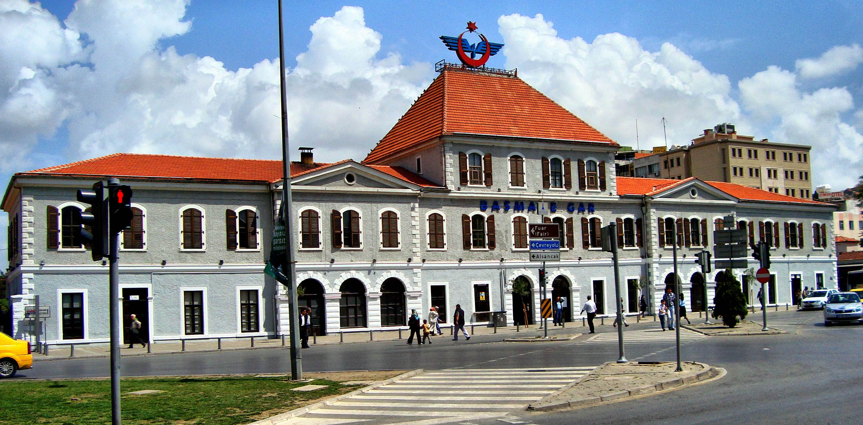 Basmane Garı-İzmir